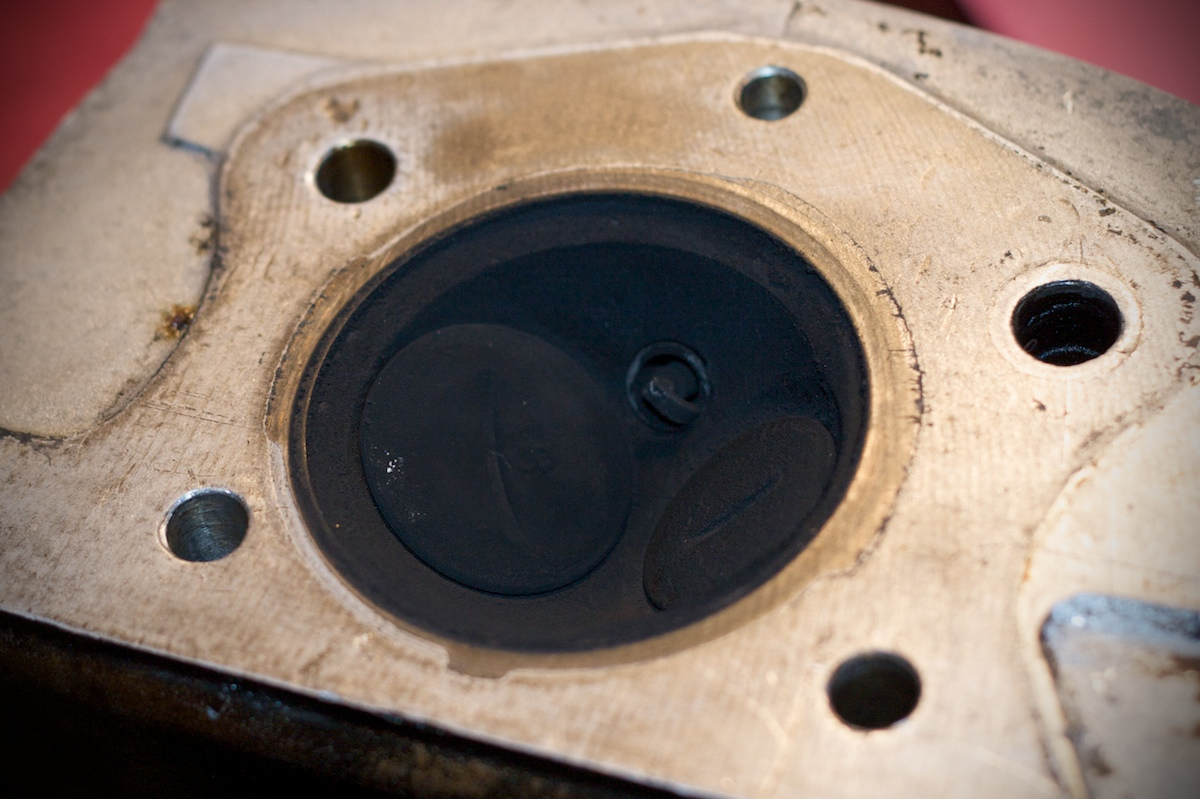 Soupapes d'admission et d'échappement d'un moteur thermique